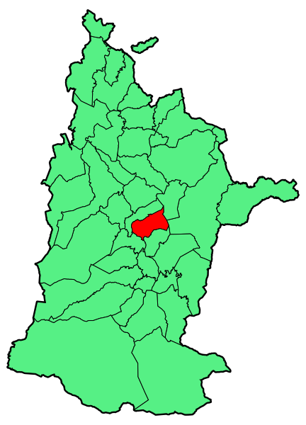 Aipaturiko udalerriaren kokapena Zuberoan